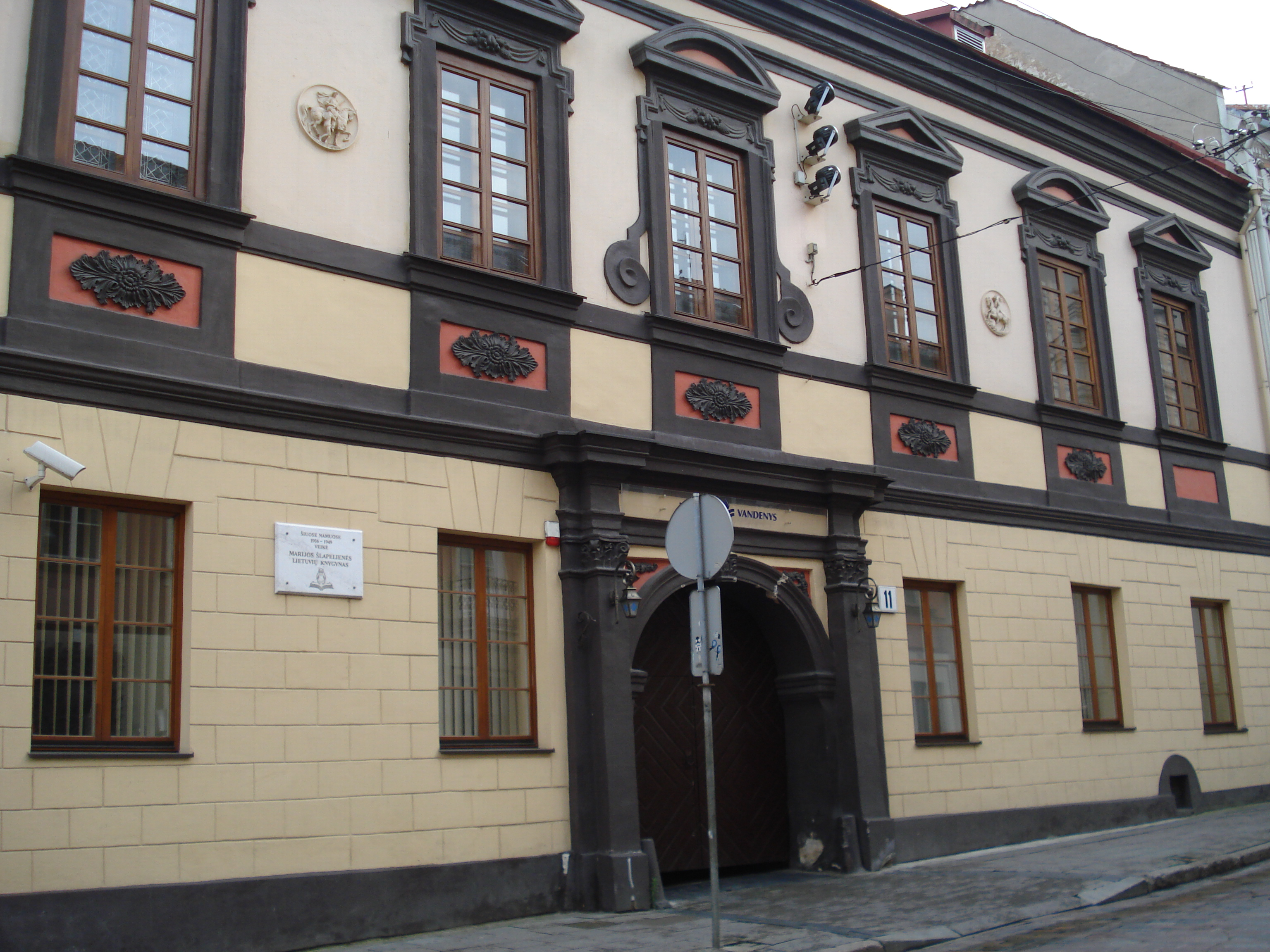 Pociej Palace in Vilnius, Dominikonų g. 11